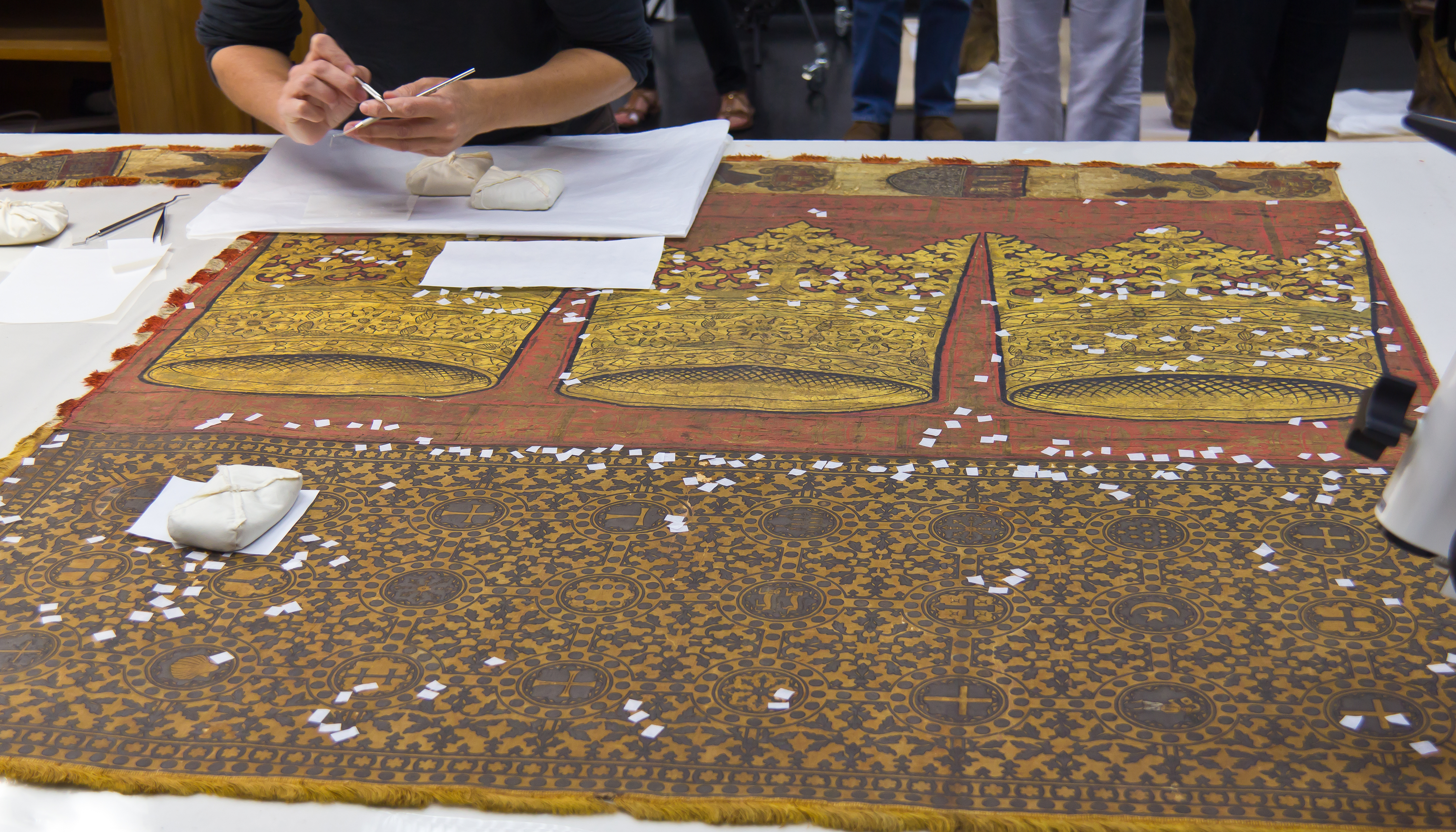 Das Dreikronenbanner (Kölner Stadtbanner) wird in der Werkstatt des Museum Schnütgen für die Ausstellung „Glanz und Größe des Mittelalters - Kölner Meisterwerke aus den großen Sammlungen der Welt“, 4. November 2011-26. Februar 2012, vorbereitet. Lose, gelockerte Textilfasern und der Farbauftrag werden konserviert und gefestigt. See above